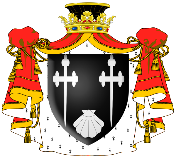 Armes de Thomas-Charles de Becdelièvre (†1711), président à mortier au parlement de Normandie. Avec dessins d'origine de Jimmy44.